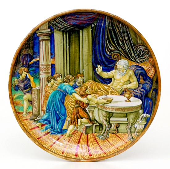 Piatto istoriato dipinto da Xanto Avelli e lustrato a Gubbio nella bottega di Mastro Giorgio Andreoli. XVI secolo